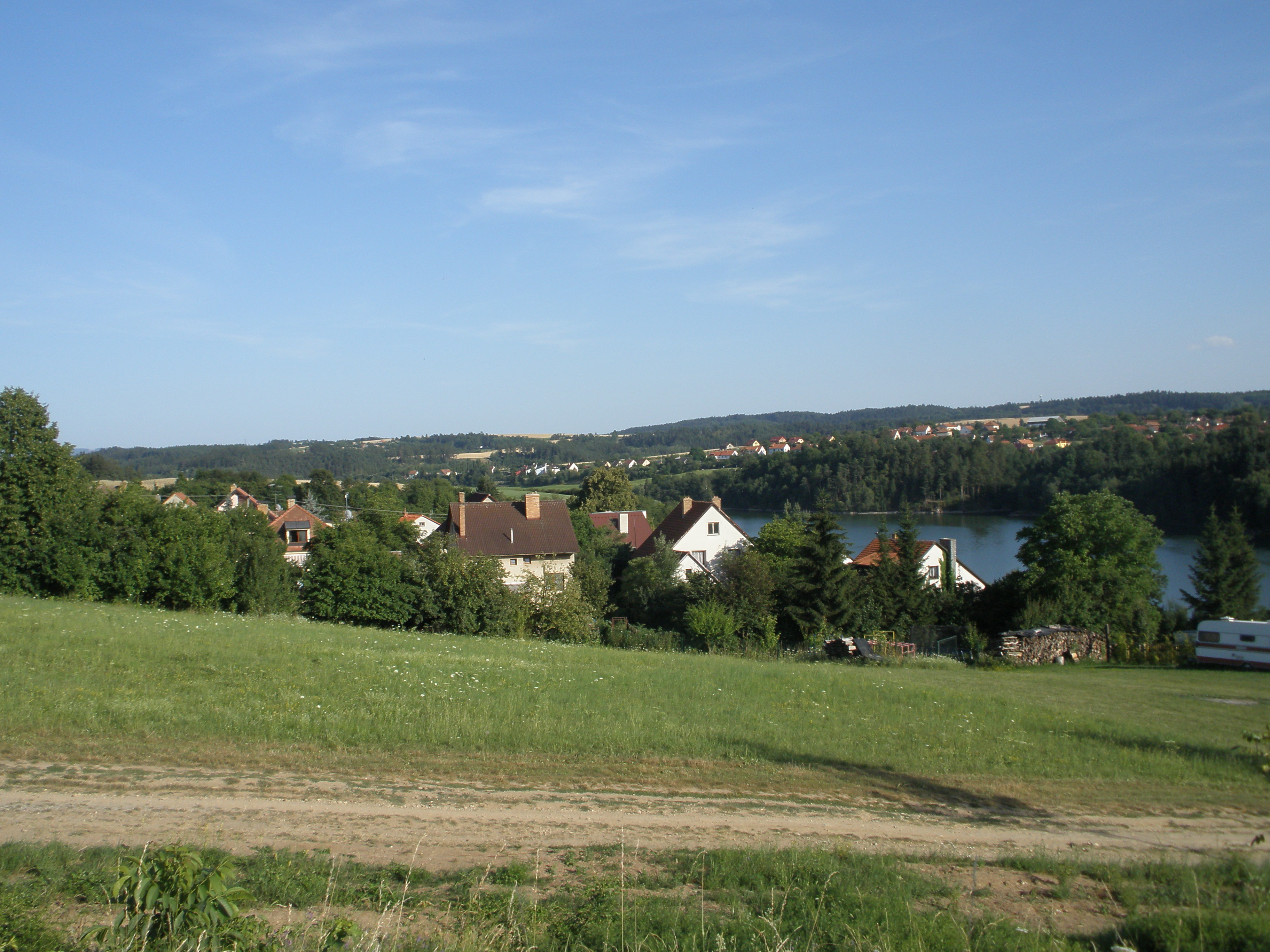 Obec Lazinov v okrese Blansko; v pozadí Vranová